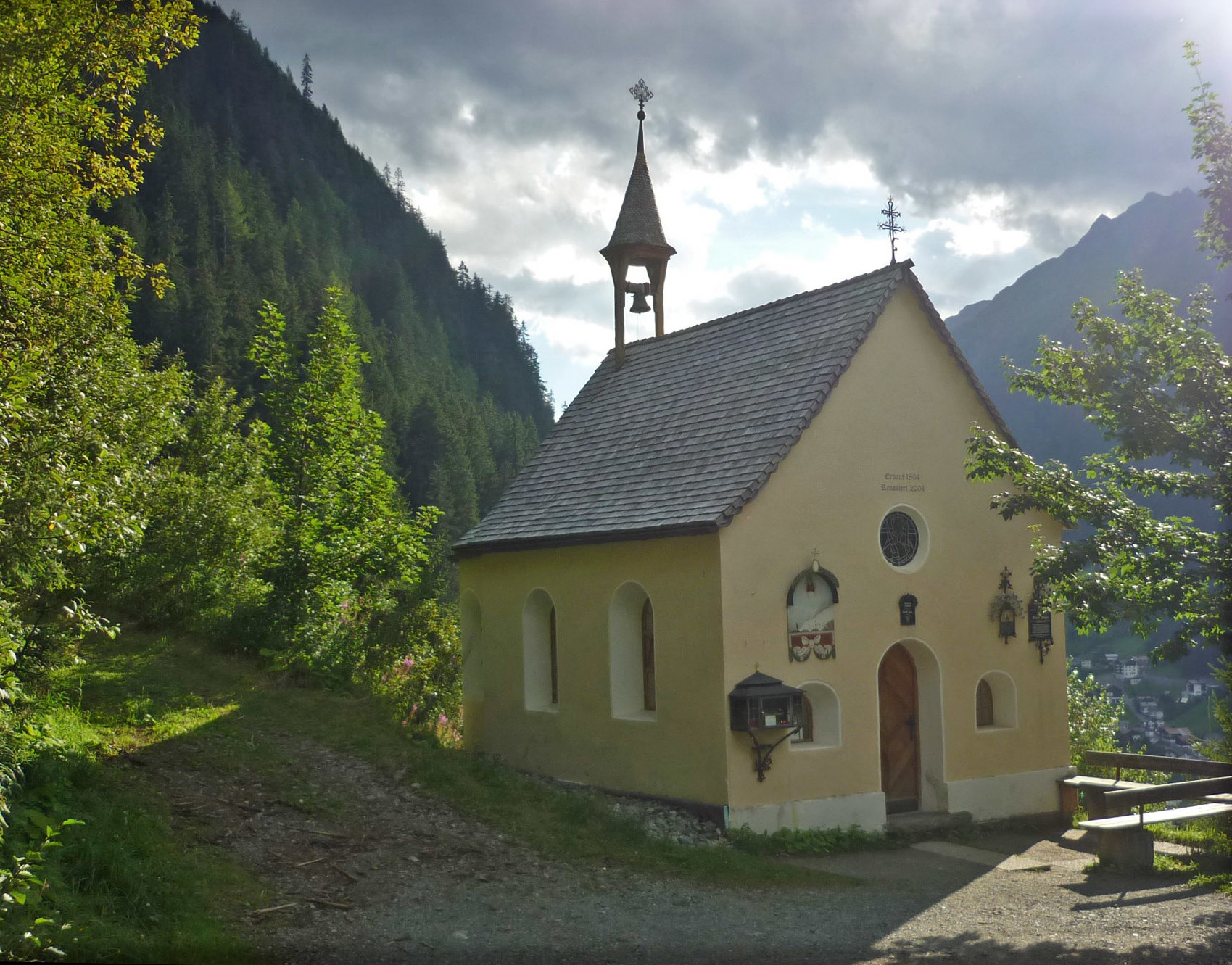 Rotwegkapelle Visnitz bei Kappl This media shows the remarkable cultural object in the Austrian state of Tyrol listed by the Tyrolean Art Cadastre with the ID 22750. (on tirisMaps, pdf, more images on Commons)